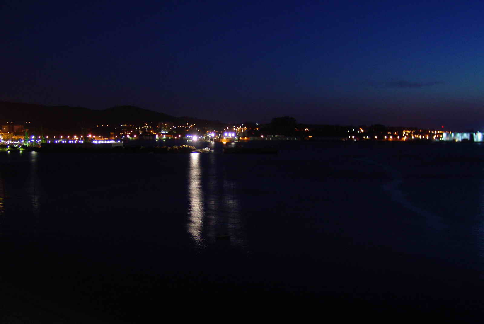 Vilagarcía - Galicia - Spain